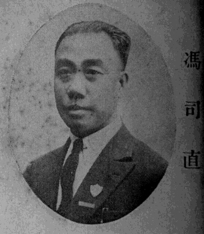 民國名人圖鑑肖像